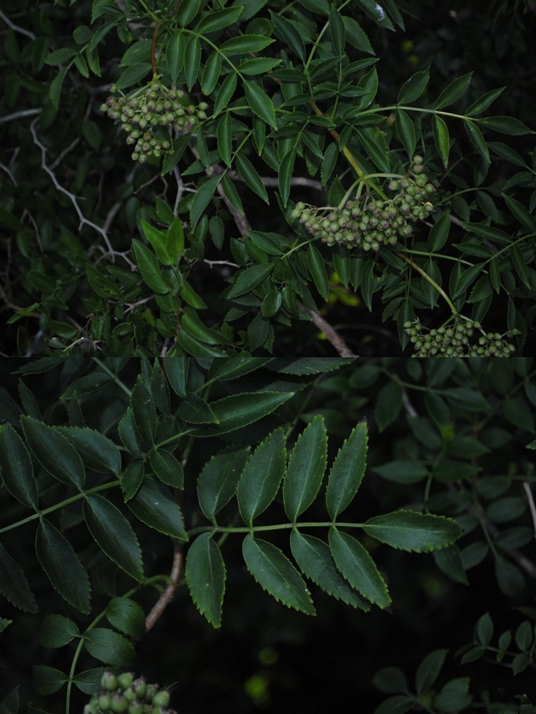 Sambucus australis. Adoxaceae. Fotos tomadas en bosque ribereño al margen del Río Rosario cerca de Nueva Helvecia, departamento de Colonia, Uruguay.